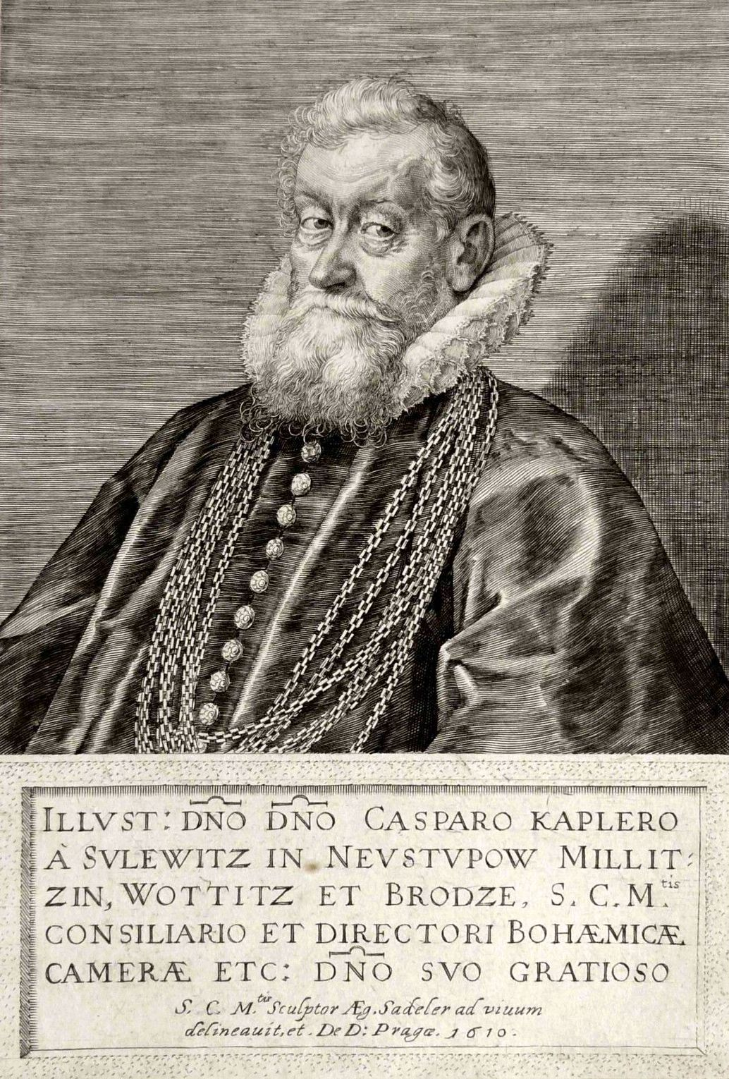 Portret Caspara Kaplera z Sulejovic, miedzioryt.